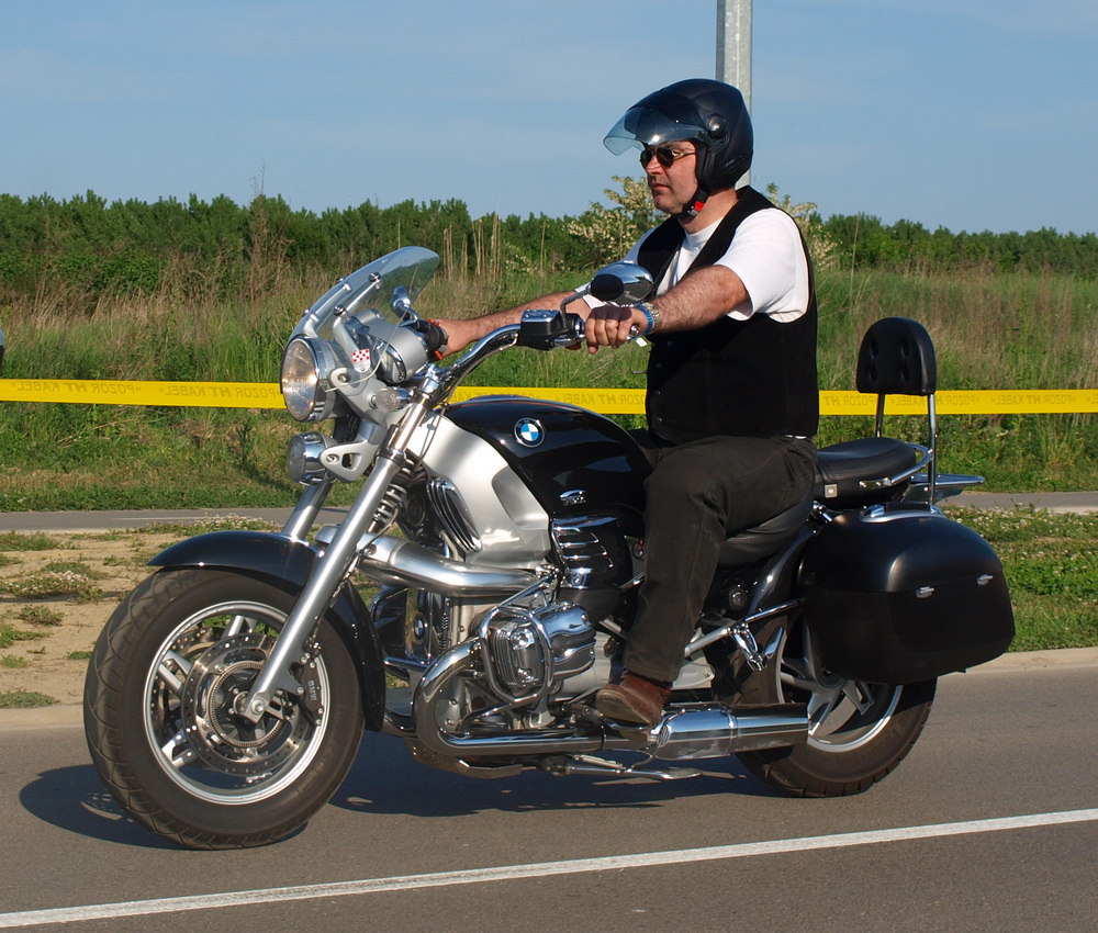 Mega Biker's susret u Slavonskom Brodu, defile ulicama grada.